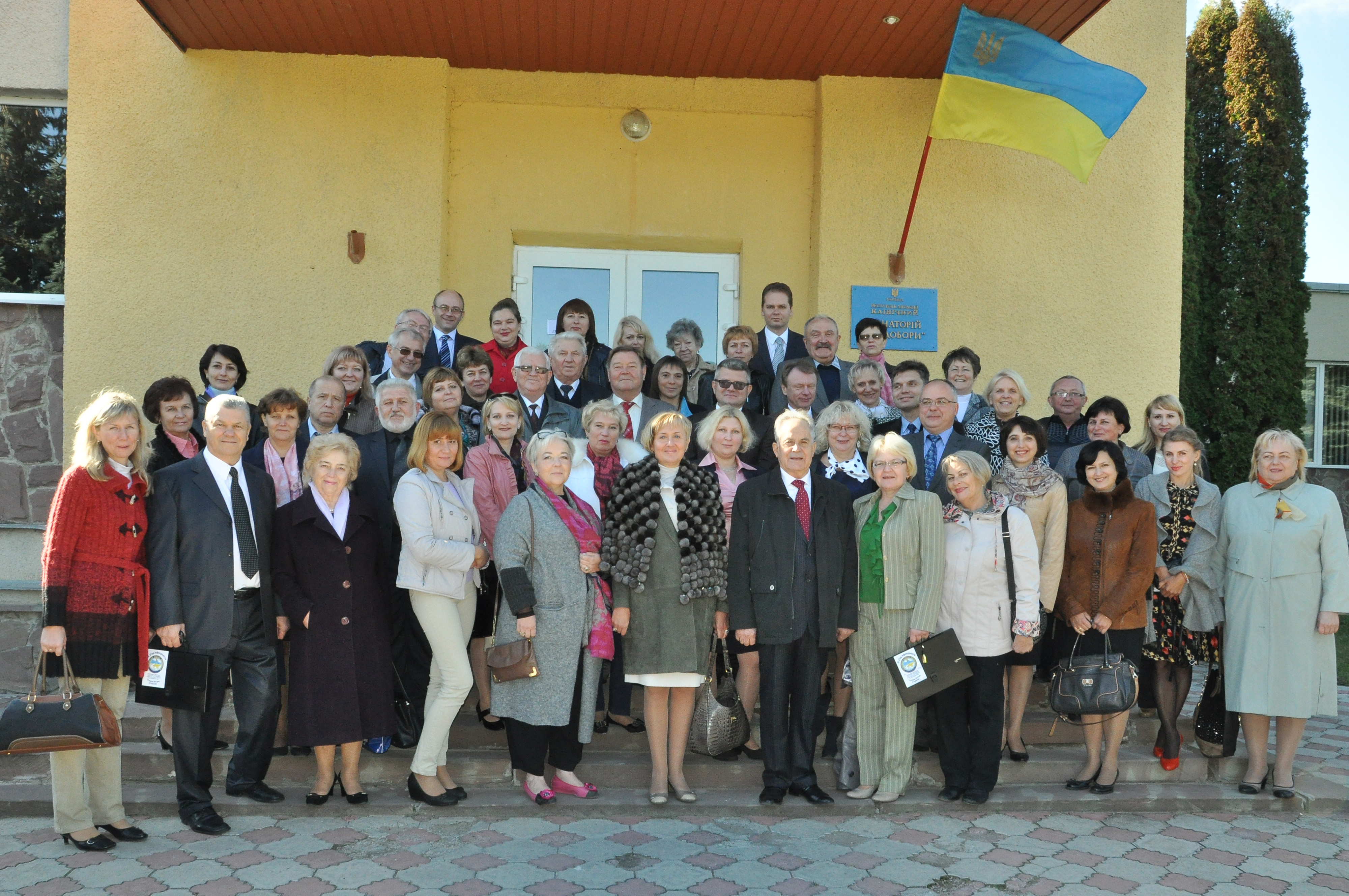 Учасники IX з'їзду інфекціоністів України, який відбувся 7–9 жовтня 2015 року в санаторії «Медобори» Теребовлянського району Тернопільської області.